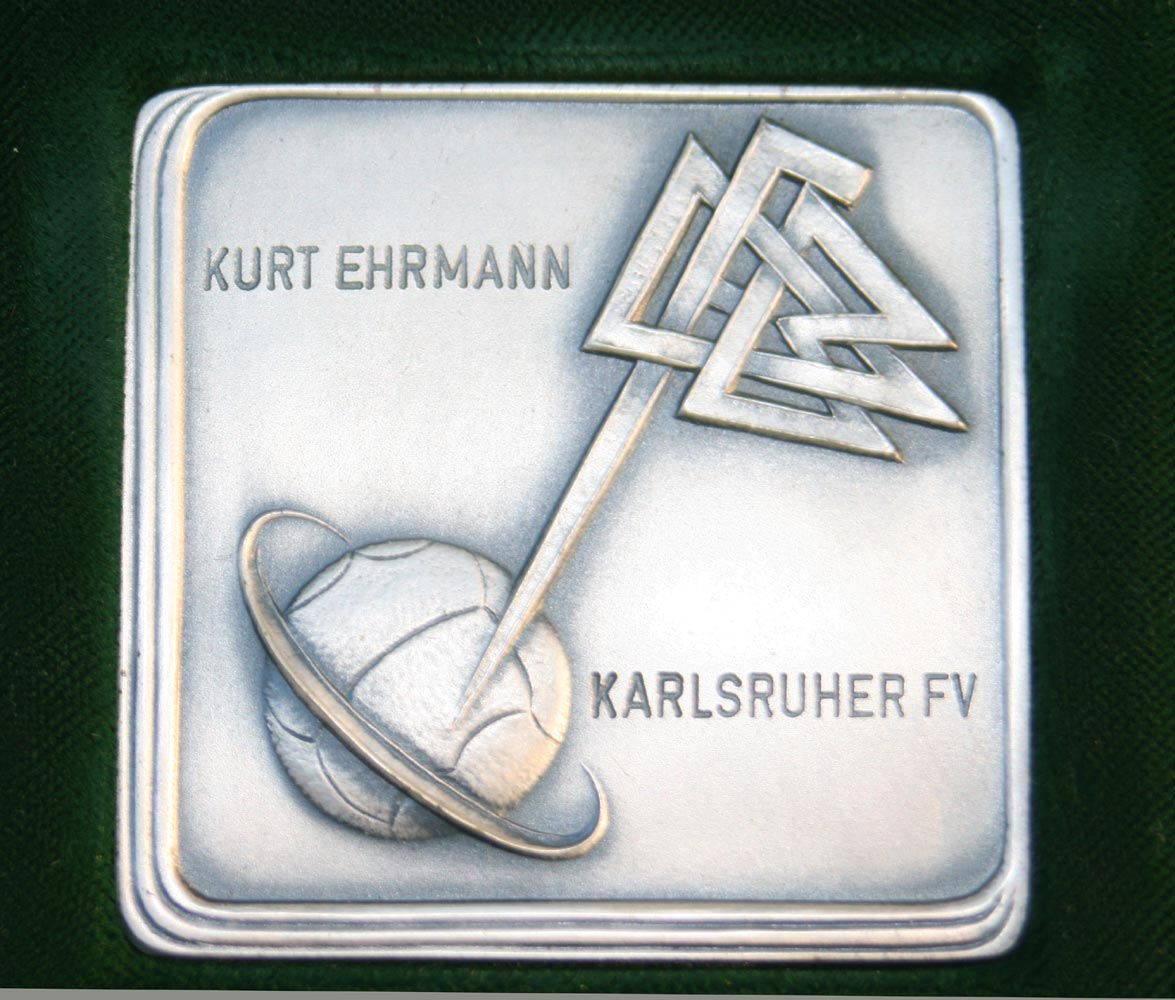 DFB-Medaille, Vorderseite